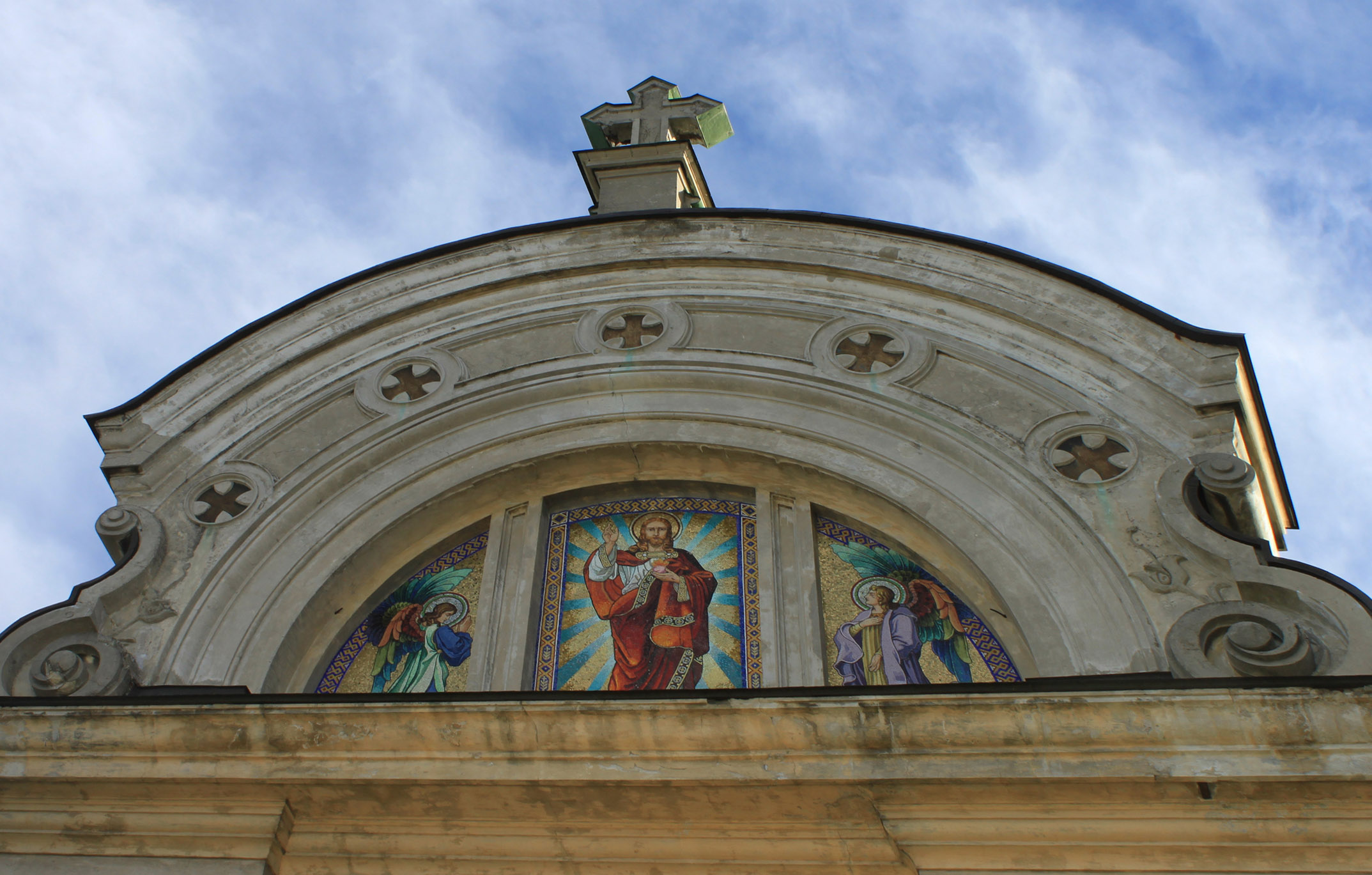 Вітраж Ю. Буцманюка